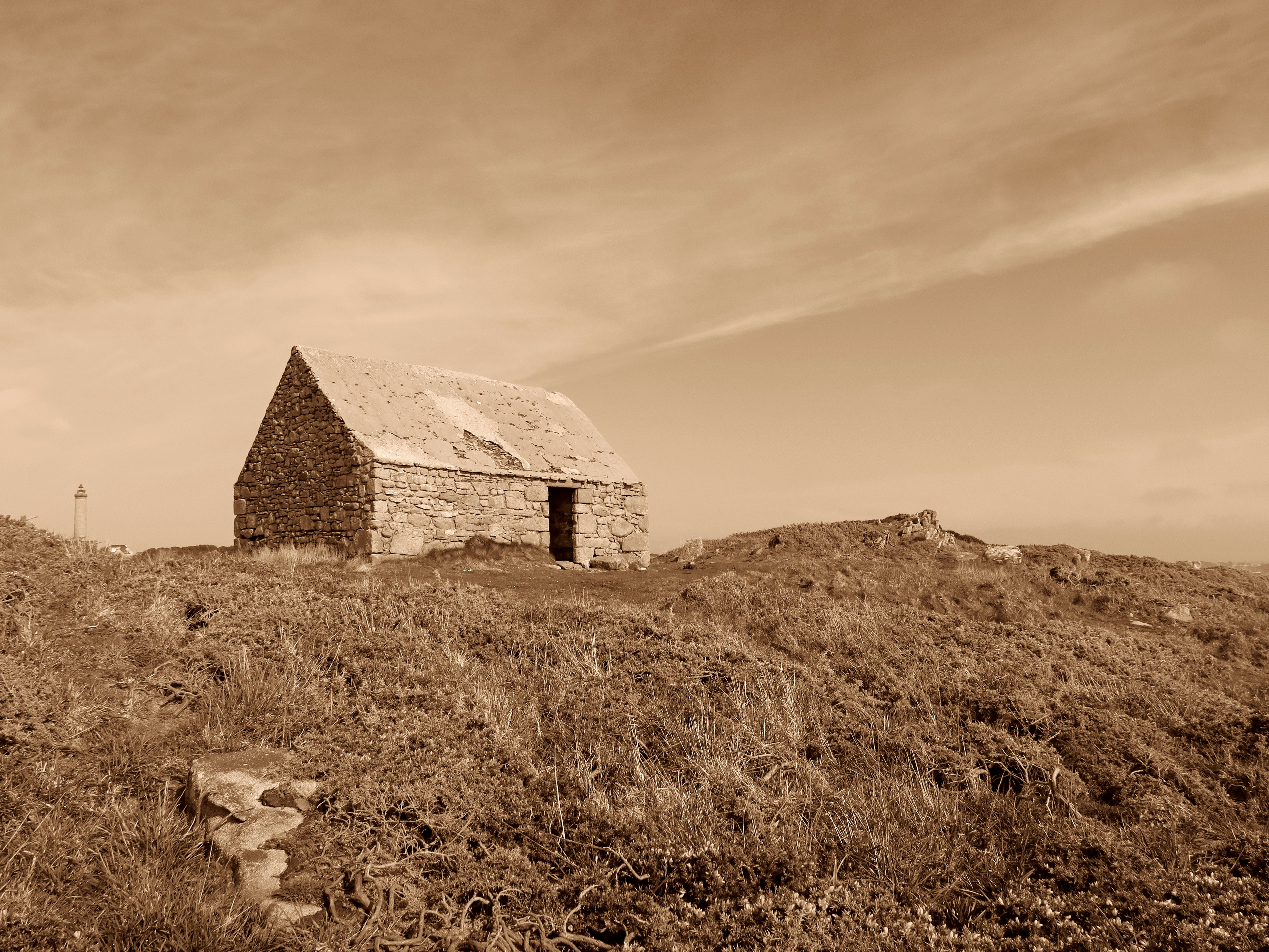 Île-de-Batz (Finistère, France) - Maison du Corsaire.